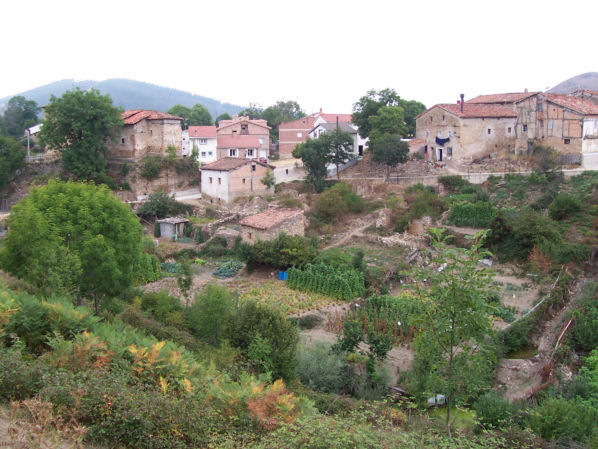 Pazuengos, localidad de La Rioja (España)